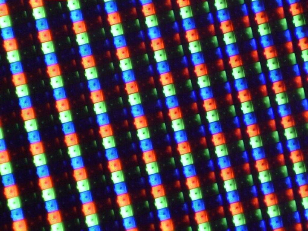 Αυτοστερεο ανοιχτο